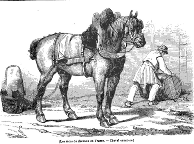 Cheval cauchois dans L' illustration: journal universel, Volume 7, Chevalier, 1846, p. 12.